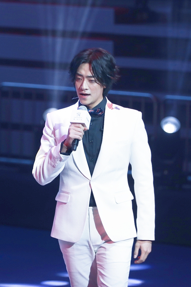 中文（中国大陆）: 2019年3月18日，郑云龙于东风标致新车发布会。